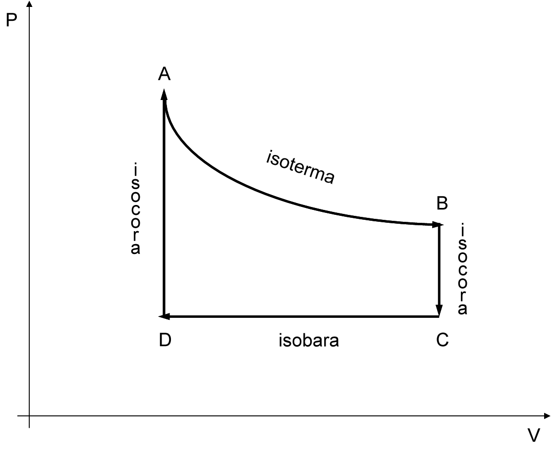 Trasformazione ciclica nel piano di Clapeyron: isoterma (A-B), iscora (B-C), isobara (D-C), isocora (D-A).